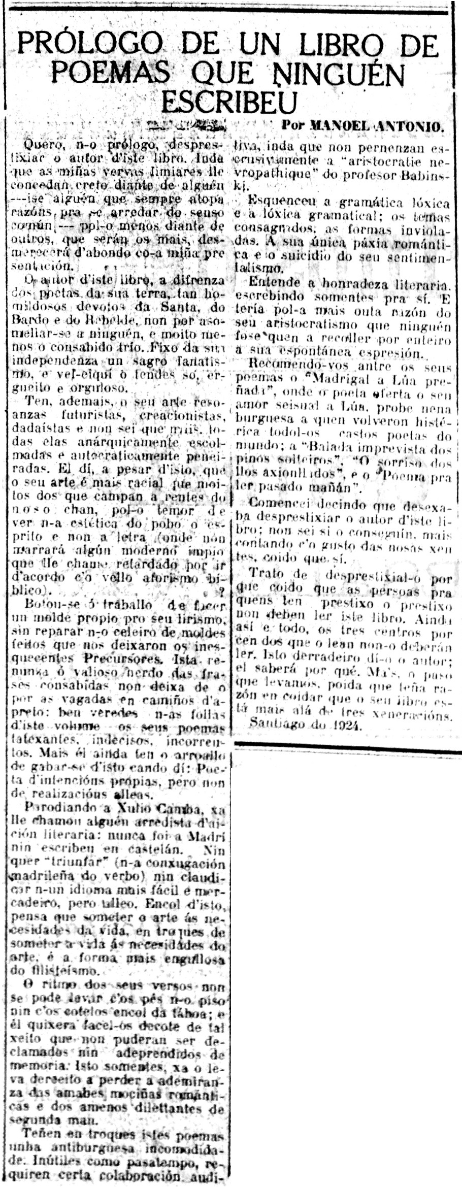 "Prólogo de un libro de poemas que ninguén escribeu"